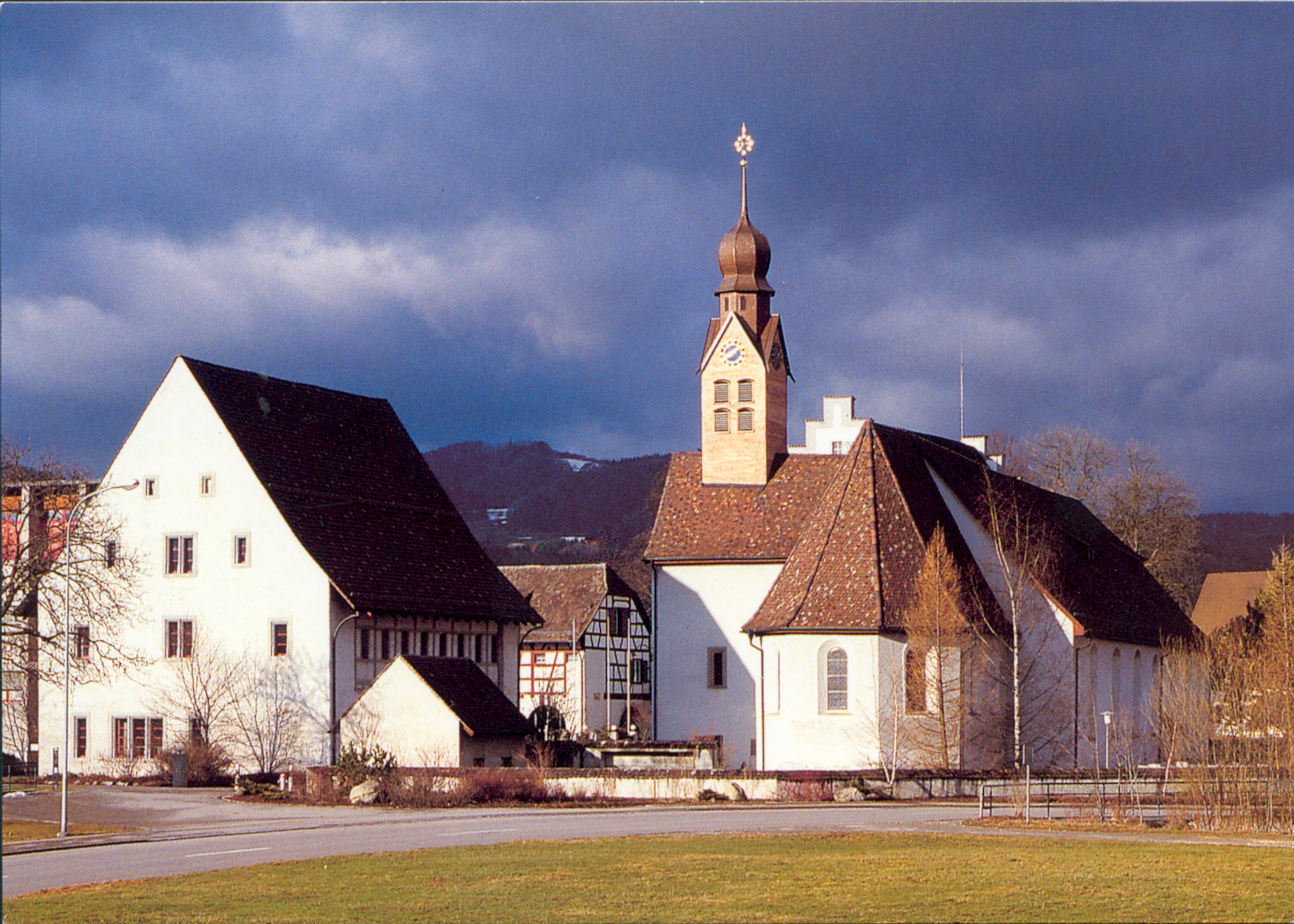 Klosterkirche Tänikon, links das Refental (ehemals Refektorium)